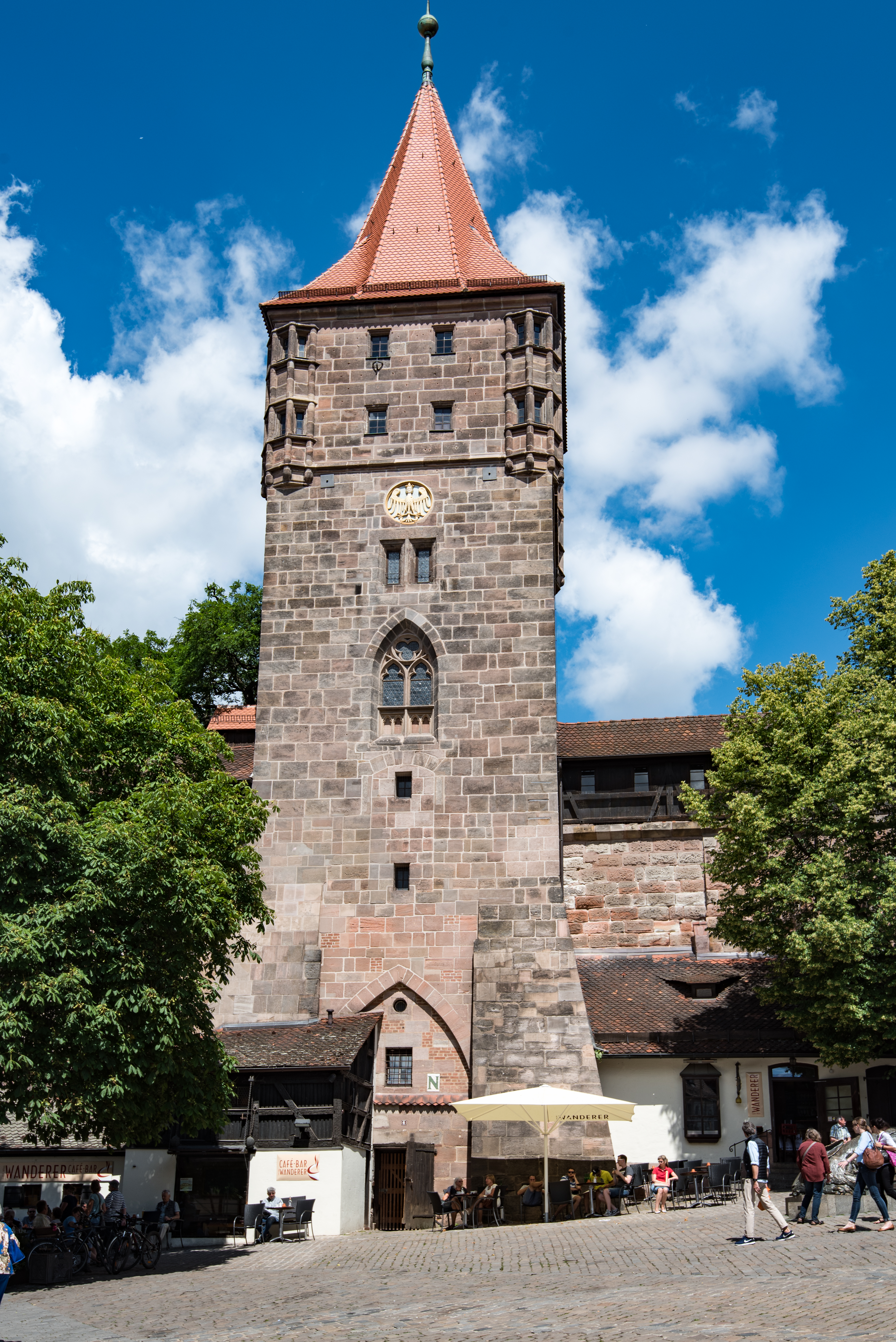 Nürnberg, Stadtbefestigung, Tiergärtnertormturm, Sicht vom Tiergärtnertorplatz nach Westen